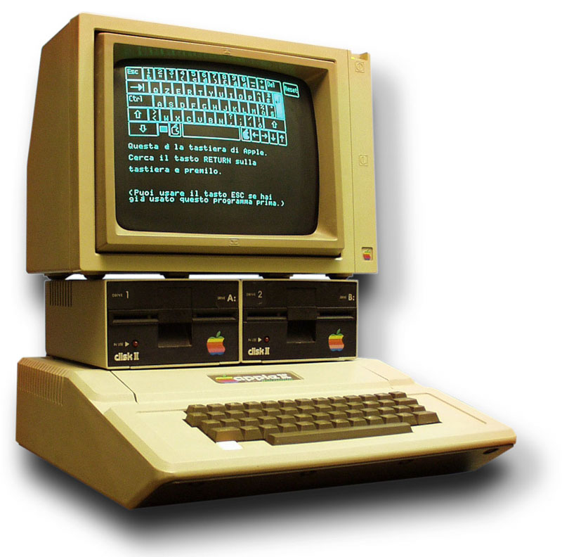 Apple II europlus.